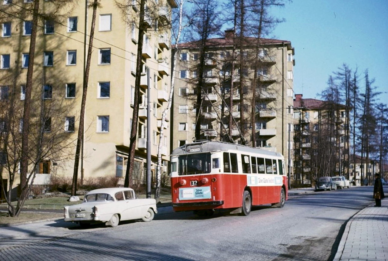 Trådbuss på Sandhamnsgatans norra del